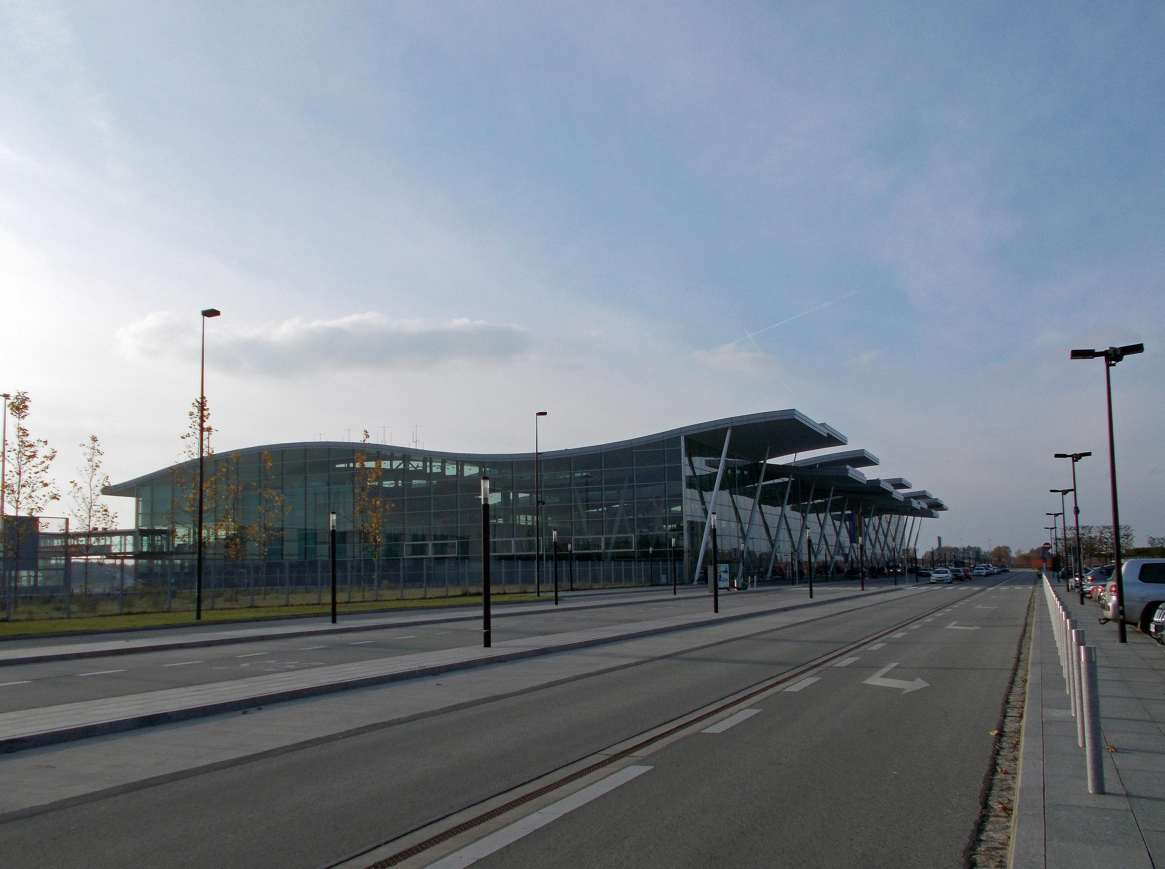 Flughafen Breslau (Polen)